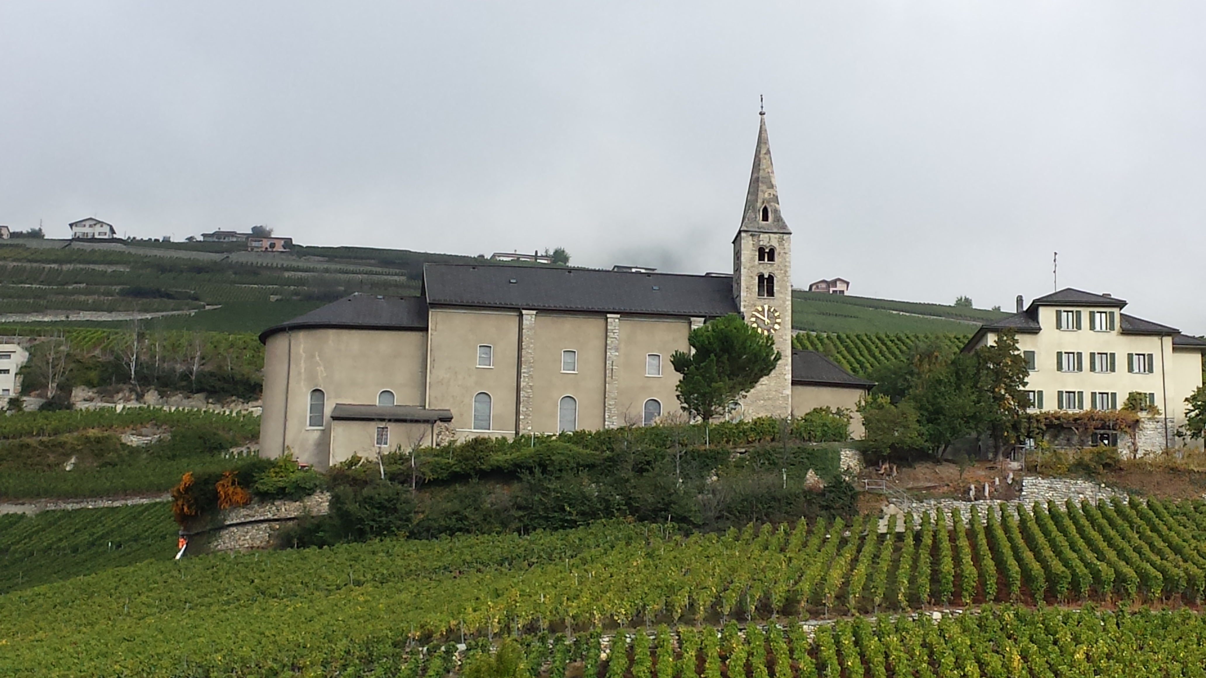 Kirche Saint-Séverin